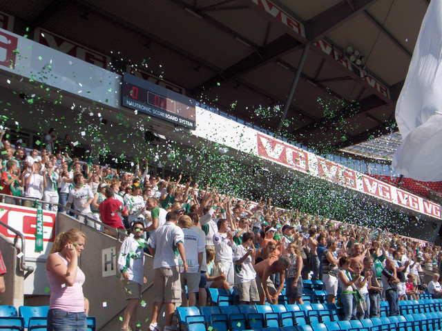 Briskebybanden på Ullevaal borte mot Vålerenga IF.